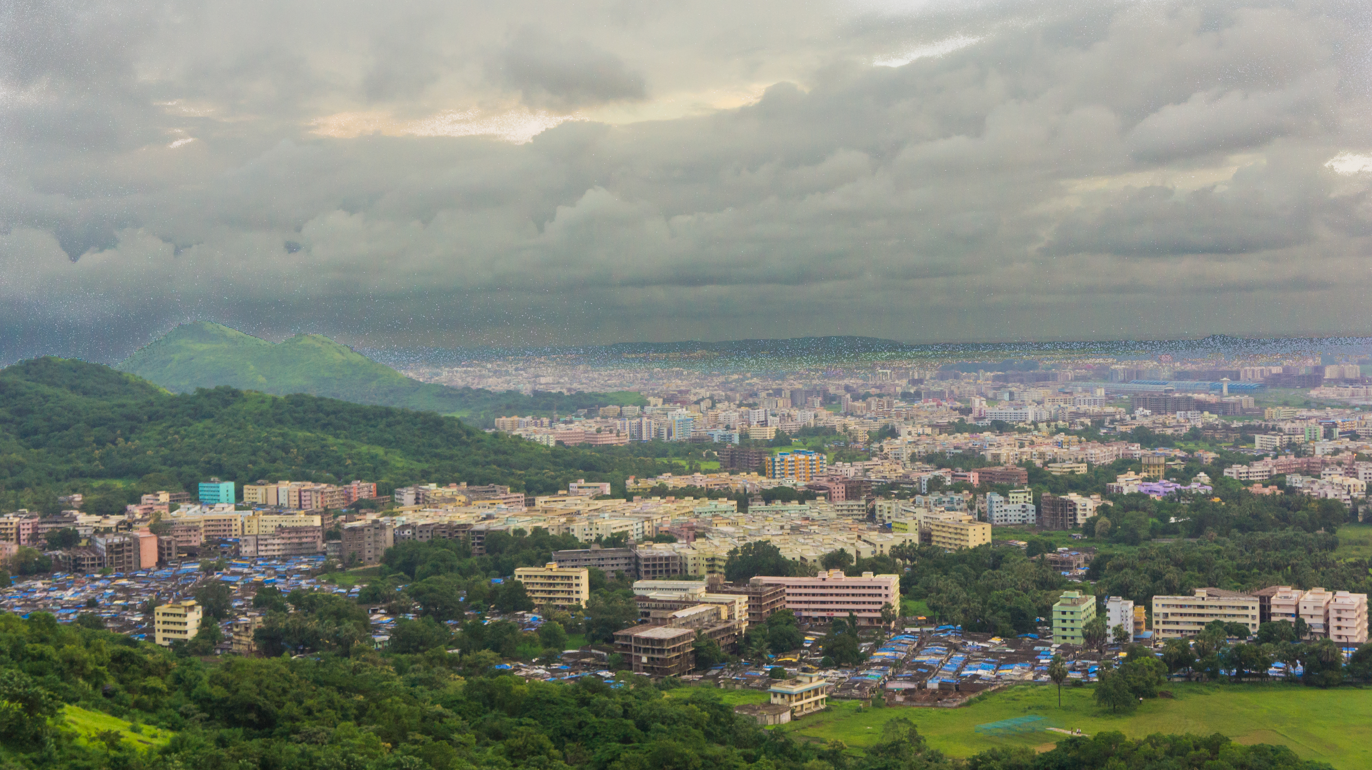 JivDani,Virar